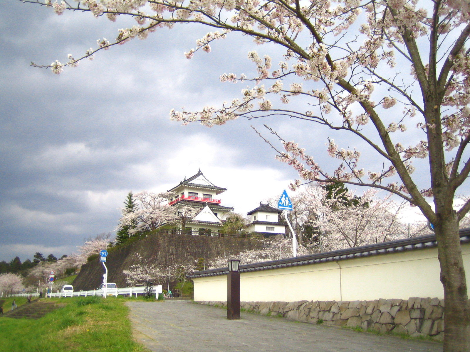 Wakuya Castle